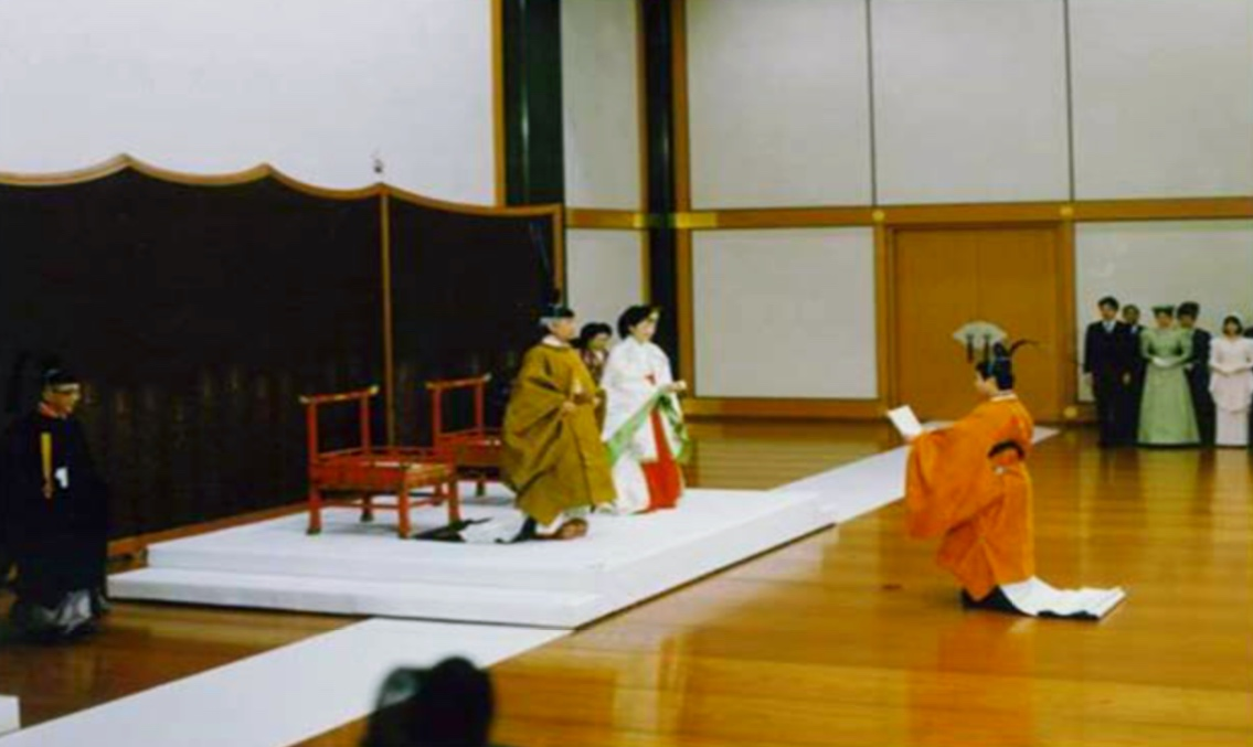 皇太子徳仁親王（第126代天皇）の立太子礼。檀に立っている人物は、こちらから見て左が第125代天皇（上皇明仁）、右が皇后美智子（上皇后美智子）。剣璽等承継の儀の画像。 資料2「天皇陛下の御即位に伴う式典等の実例について（首相官邸）」（ ）を加工して作成した。